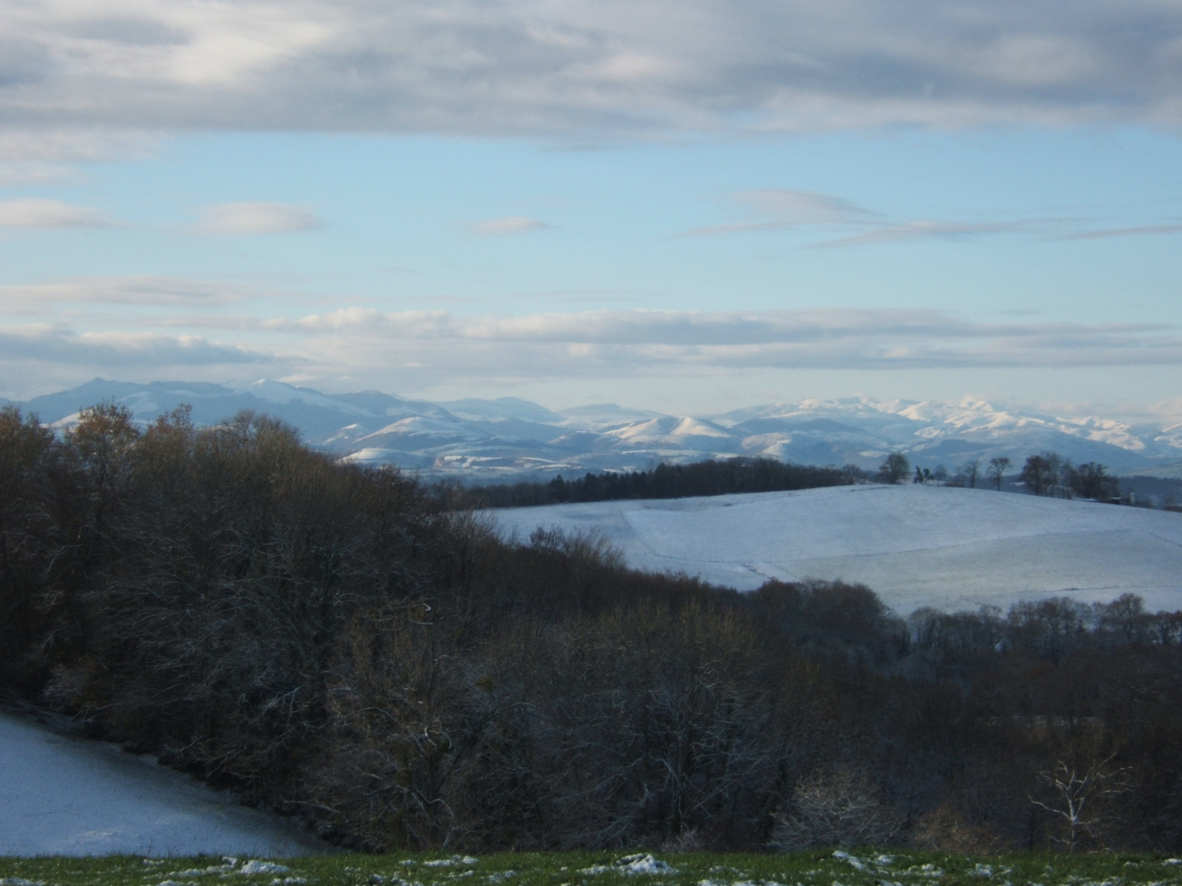 La vue sur les montagnes visible d'Orion